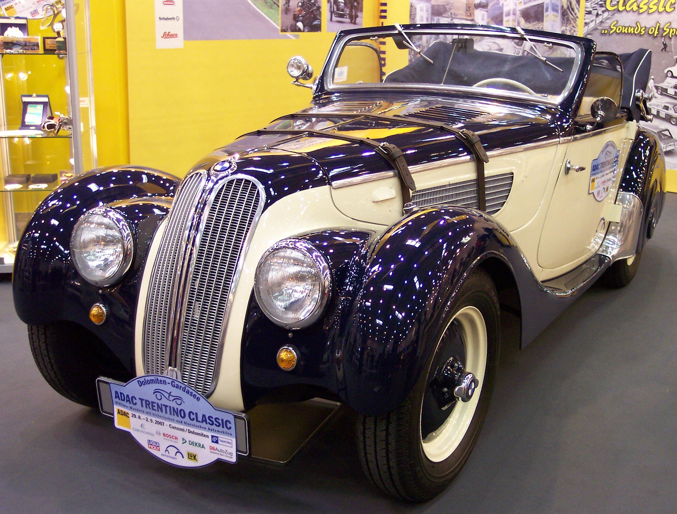 BMW 328